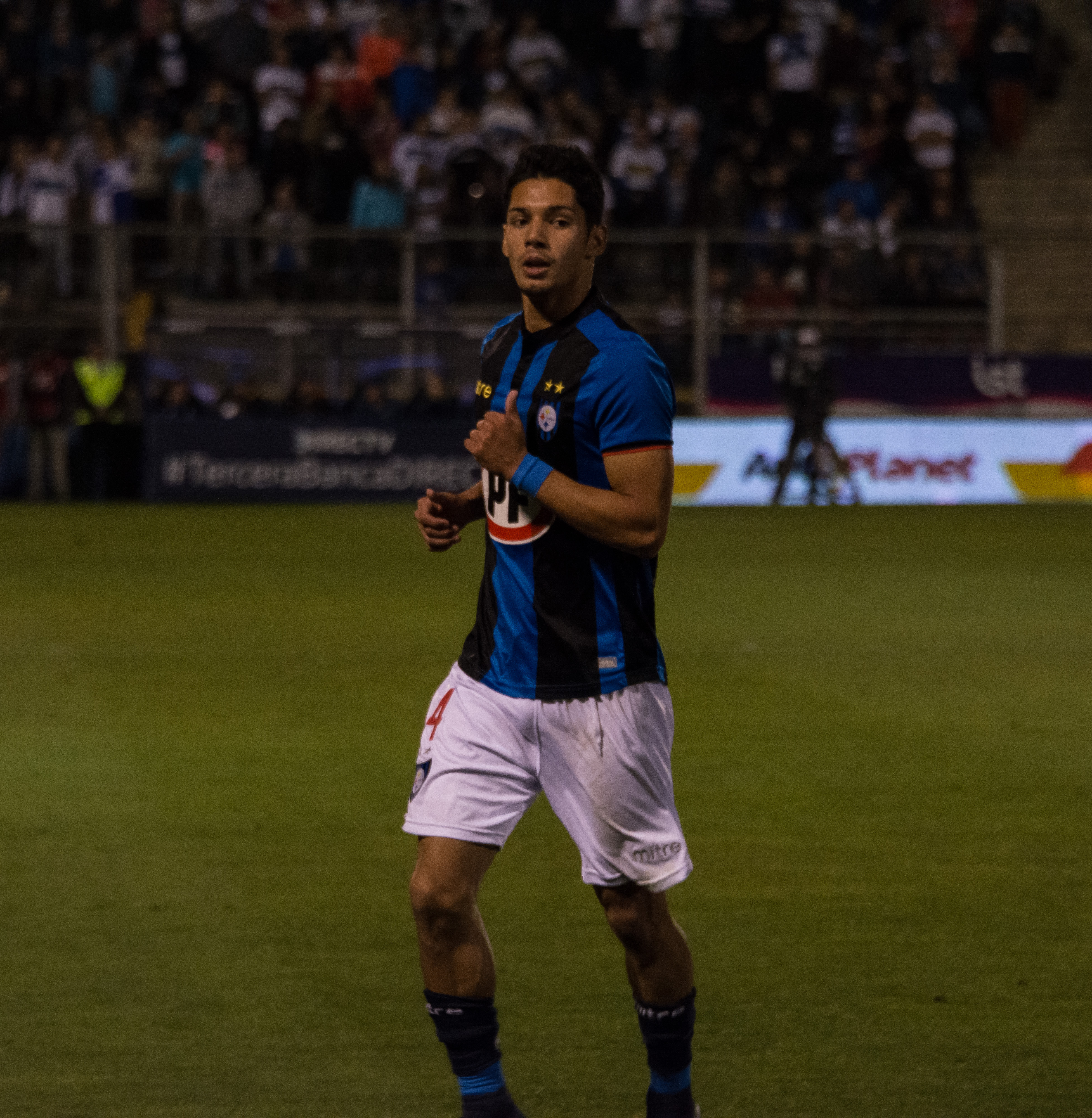 Universidad Católica v Huachipato, Estadio San Carlos de Apoquindo, Las Condes, Santiago, Chile.